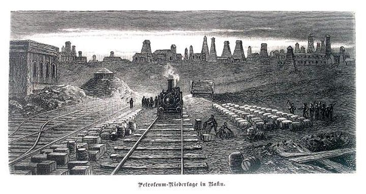 Картина, изображающая начало нефтеперевозок по ж/д Баку-Сабунчи-Сураханы. 1884г.